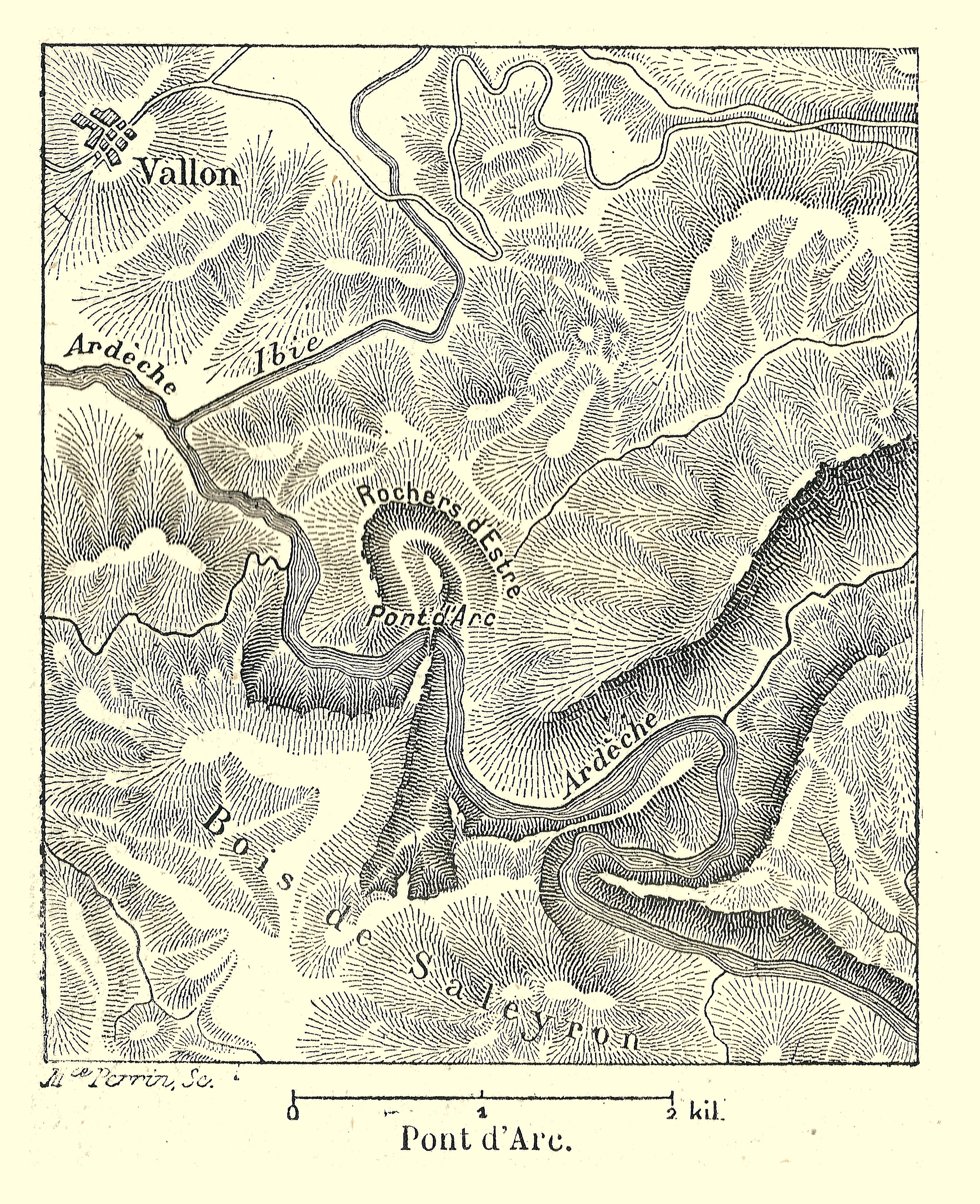 Carte de Franz Schrader